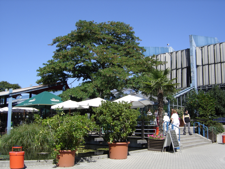 Mannheim Luisenpark Pflanzenschauhaus.